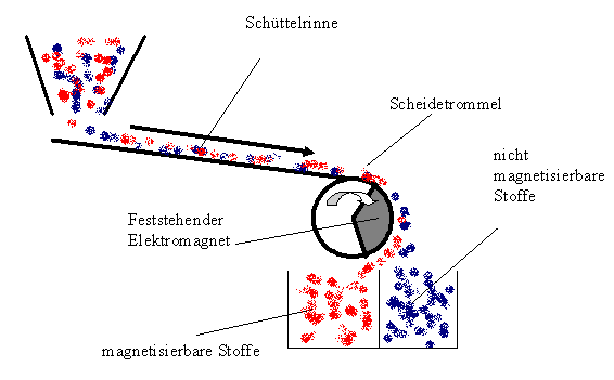 Funktionsprinzip des Magnettrommelabscheiders